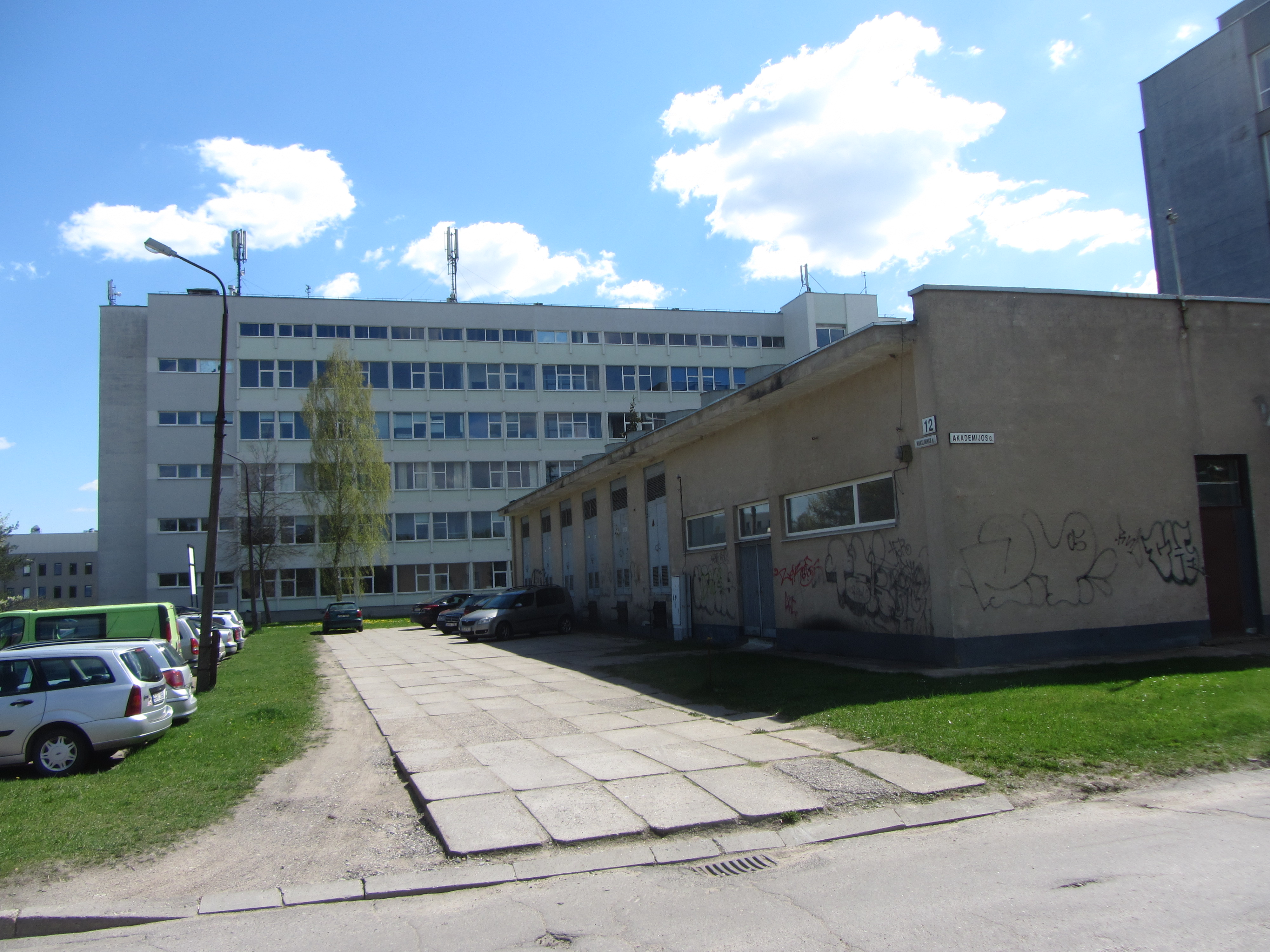 Visoriai, Vilnius, Lithuania